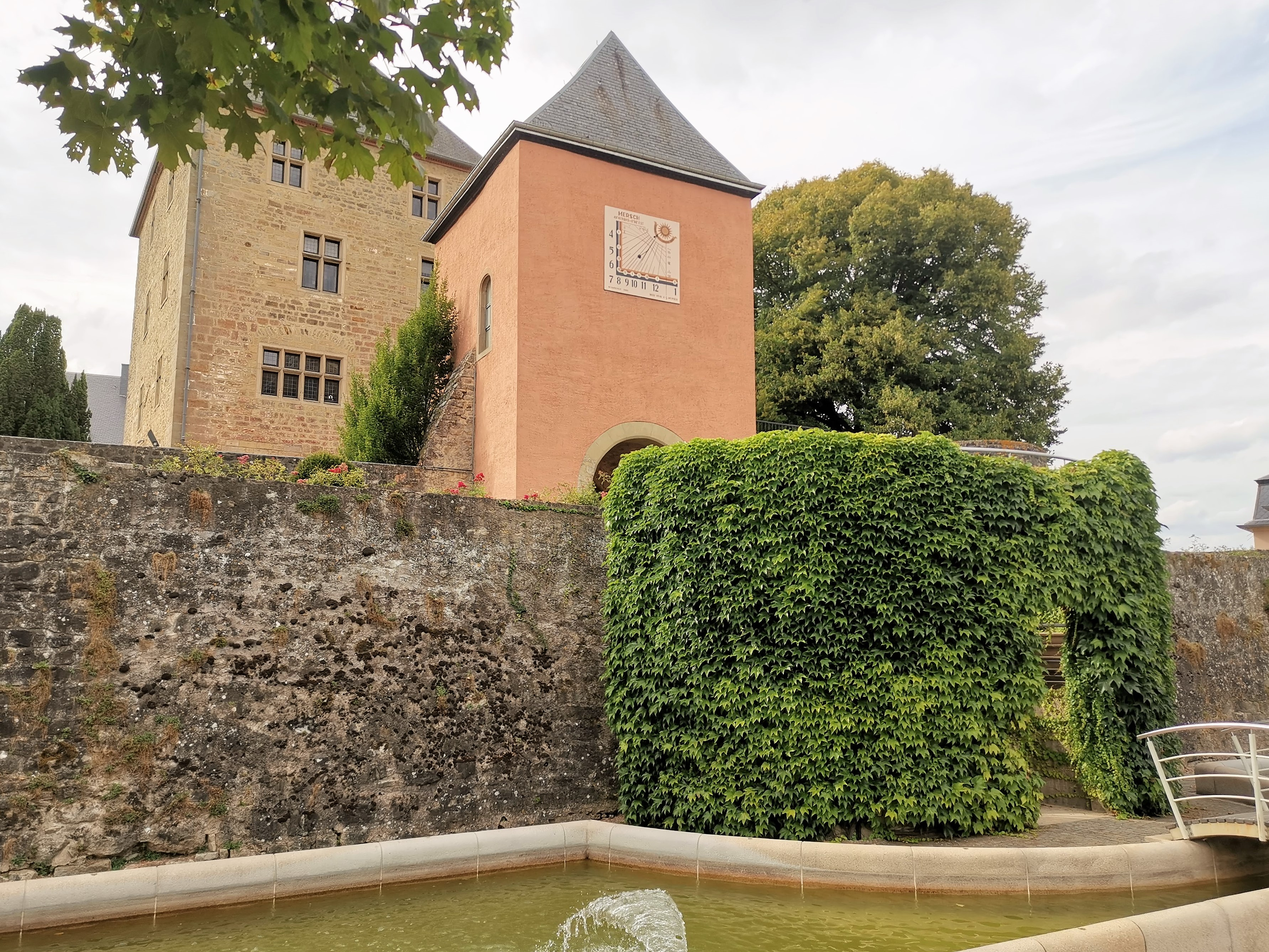 Am Schlass vum Miersch sinn haut Verwaltungsservicer vun der Gemeng Miersch ënnerbruecht.